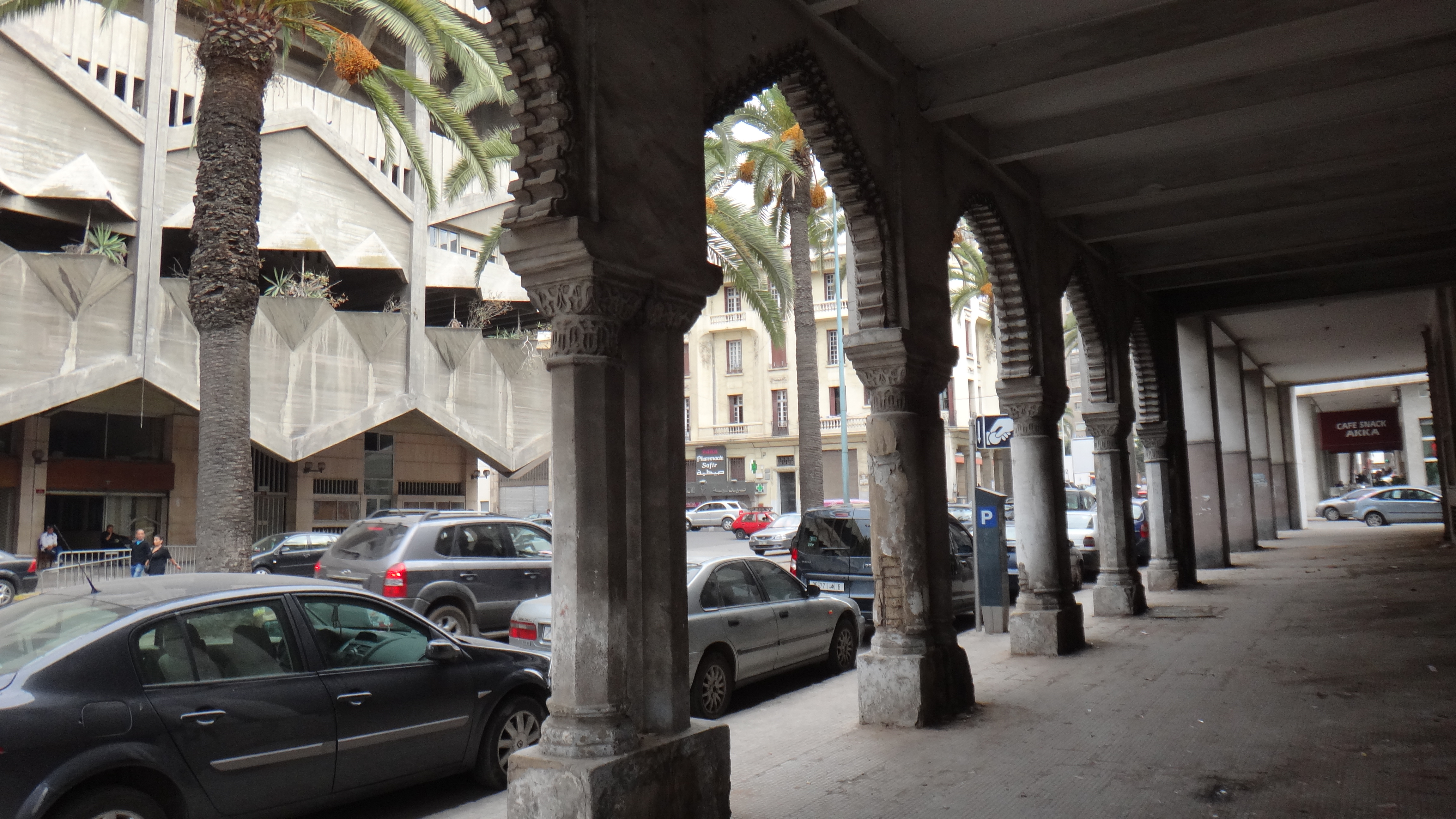 Casablanca 20000, Morocco